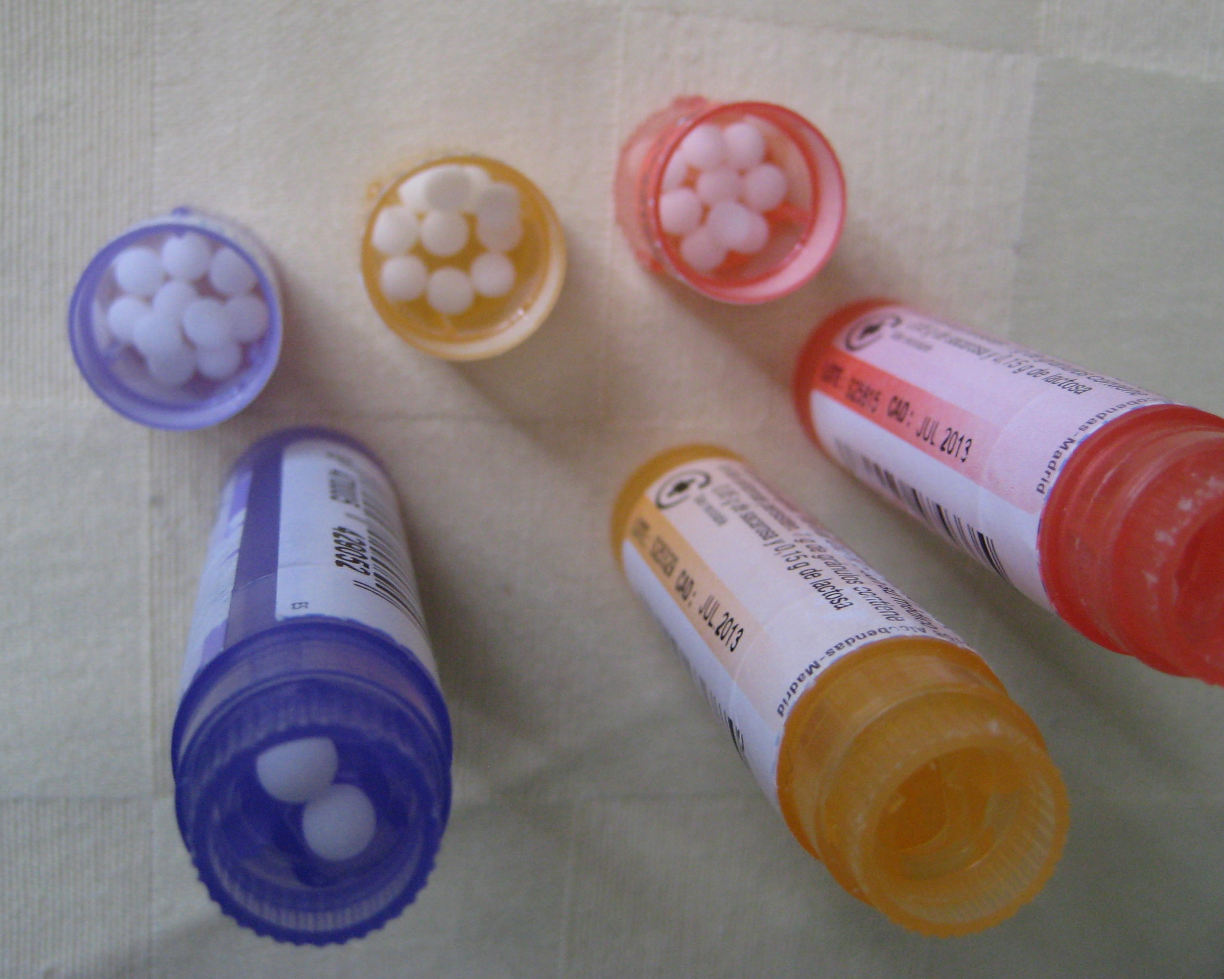 Tubos con comprimidos para tratamientos homeopáticos (bolitas compuestas de lactosa y sacarosa, pero con diferentes presentaciones y nombres).